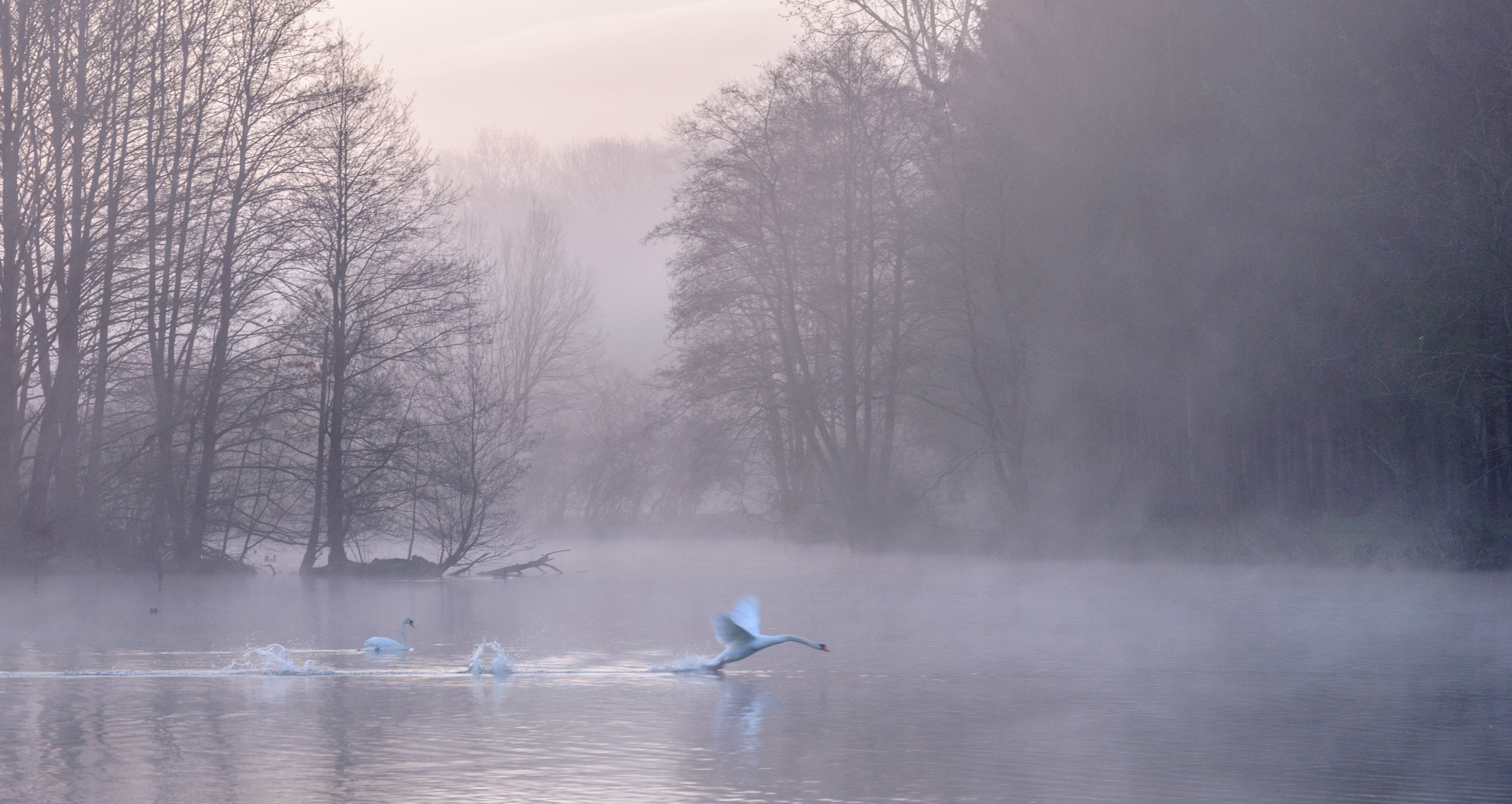 Habituel ballet printanier sur les étangs de l'Avesnois.